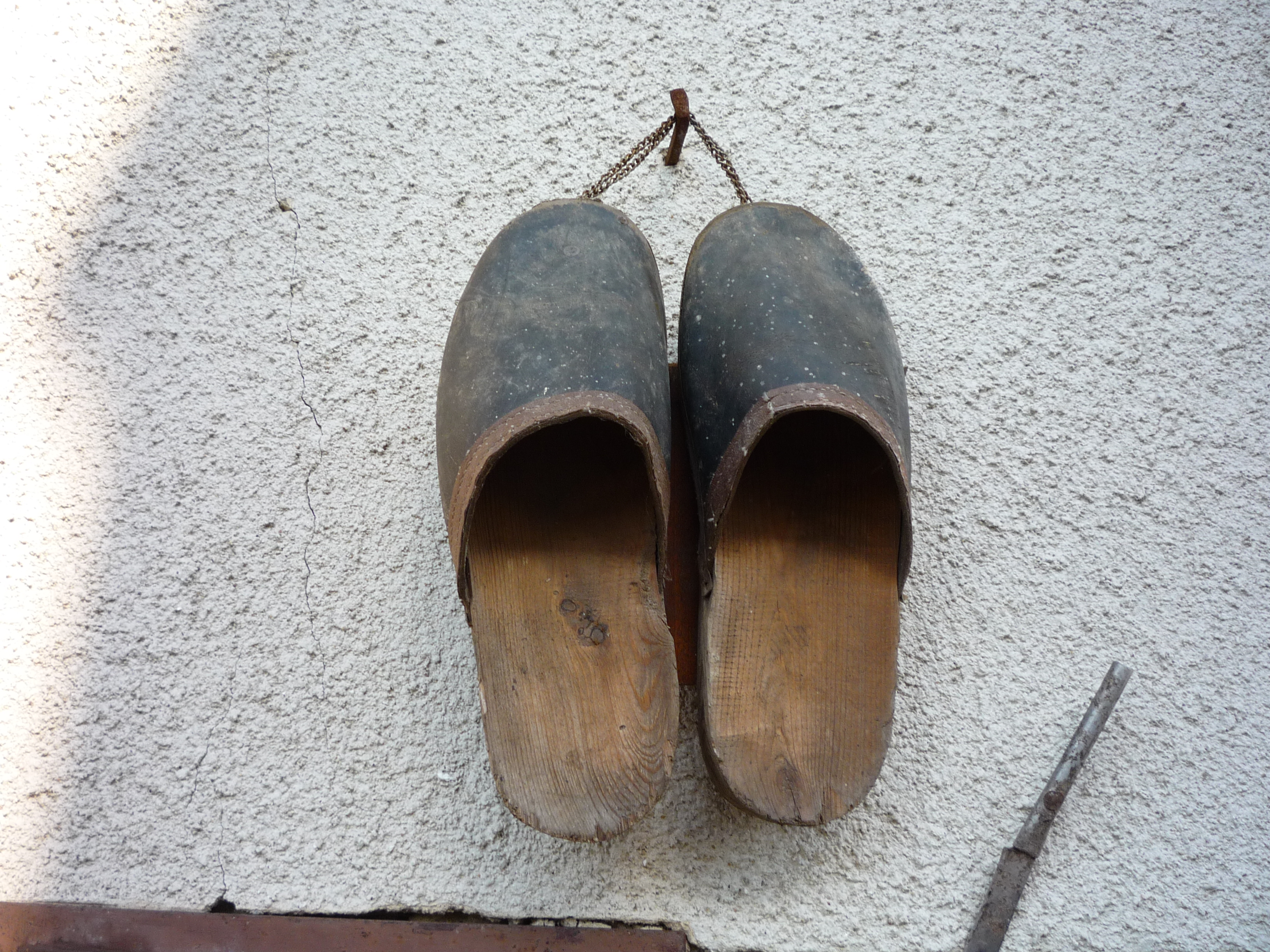 Autor fotografie Jiří Zelenka. Vysočina.